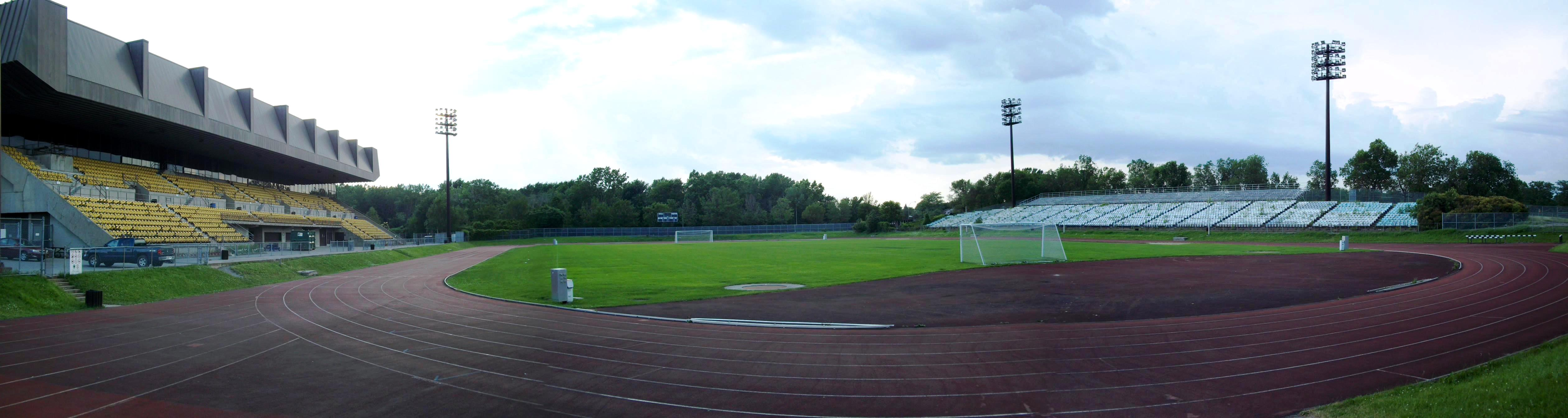 Complexe sportif Claude-Robillard, Montréal : Piste et pelouse